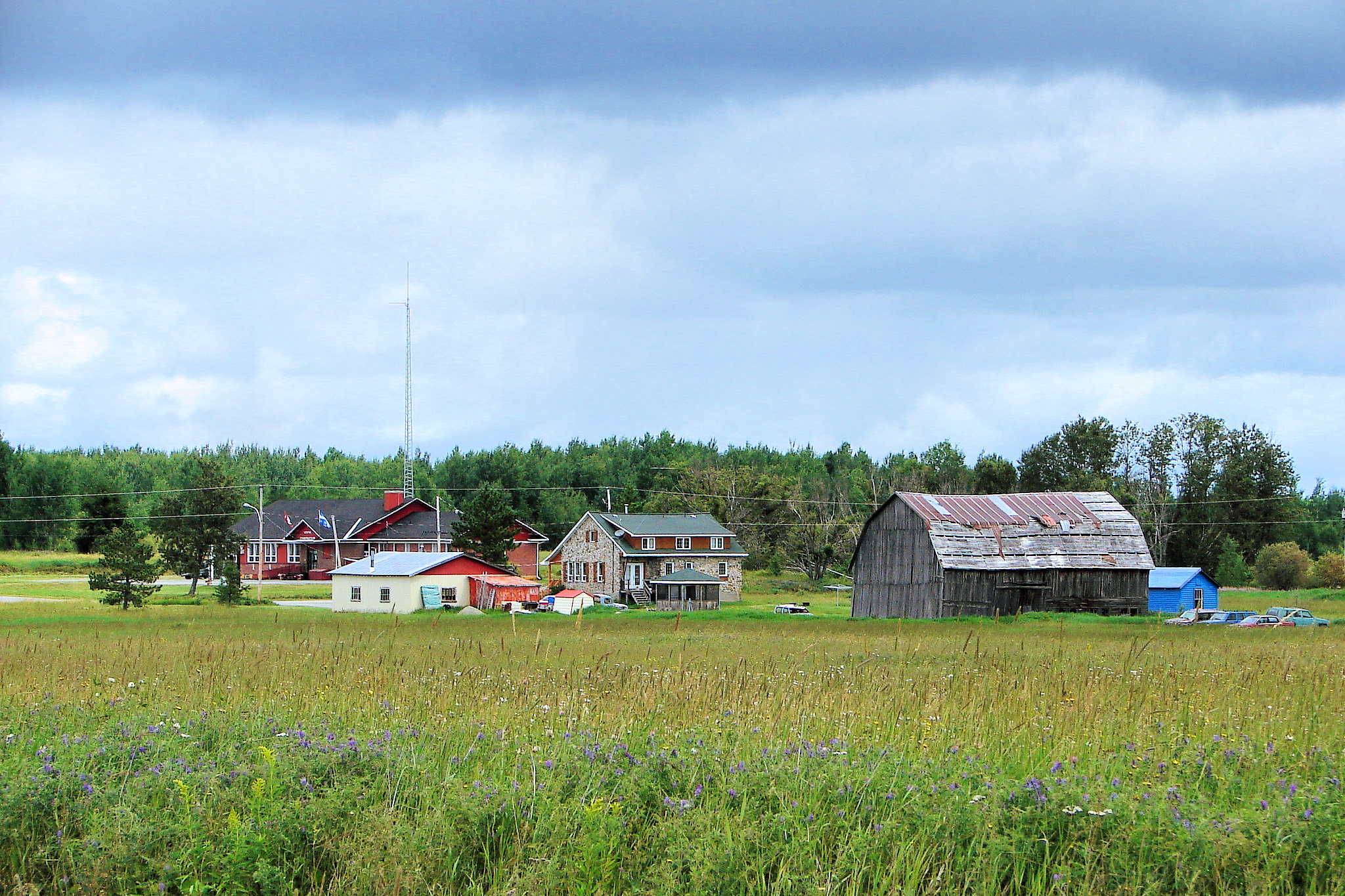 Rochebaucourt, Quebec, Canada